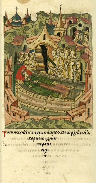 ЛИЦЕВОЙ ЛЕТОПИСНЫЙ СВОД В том году в Орде преставился князь Борис Дмитровский.